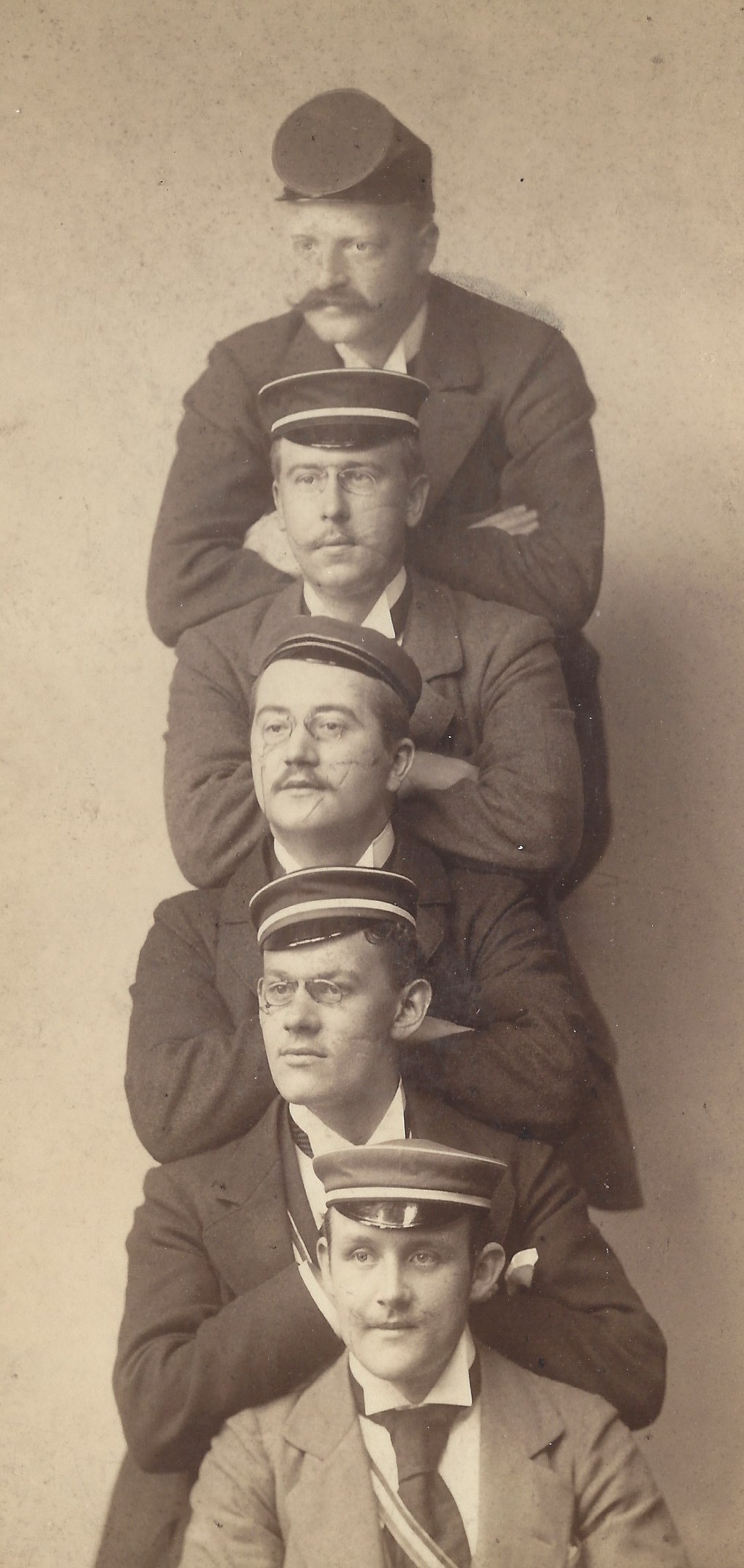 Vertreter des "gelben Kreises". Von oben nach unten: Wynen, Teutoniae Bonn; Wolff Palaio-Alsatiae, Makariae München; Jaericke Hercyniae Göttingen; Schlüter Palaio-Alsatiae, Guestphaliae Marburg und Böllinger Palaio-Alsatiae